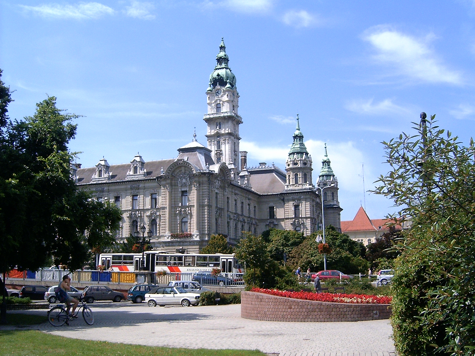 Győr cityhall